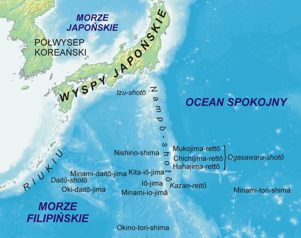 Map of Japanese island in Oceania (Ogasawara-shotō, Kazan-rettō, Minami-tori-shima, Okino-tori-shima i Daitō-shotō) in Polish. Mapa japońskich wysp w Oceanii (Ogasawara-shotō, Kazan-rettō, Minami-tori-shima, Okino-tori-shima i Daitō-shotō).